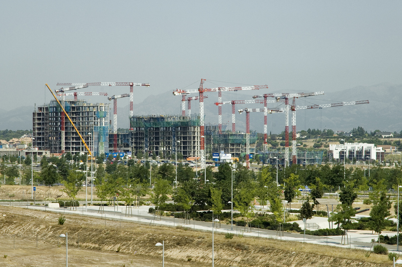 Barrio de Valdebebas en construcción en 2012